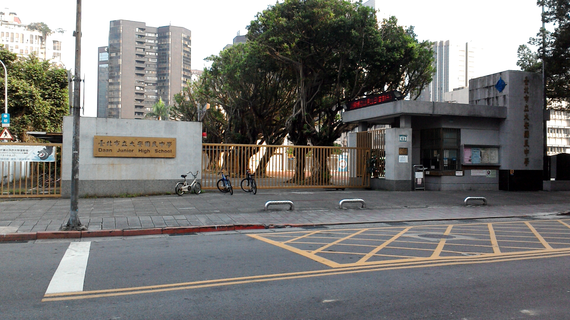 臺北市立大安國民中學前門